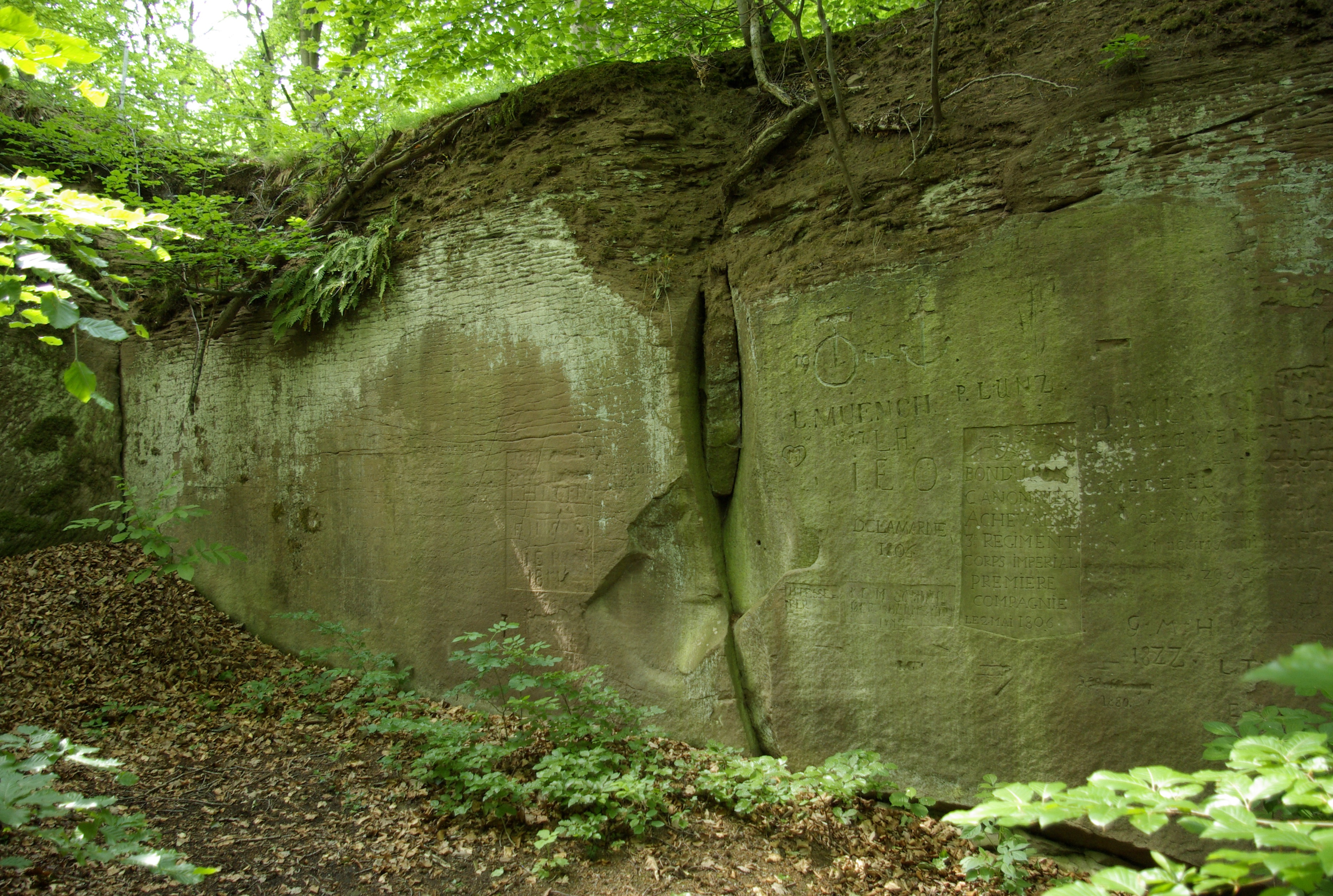 Die Fingalshöhle bei Obernzenn befindet sich auf dem Gebiet der Gemeinde Illesheim. Sie ist Geschützter Landschaftsbestandteil, Geotop und Baudenkmal.